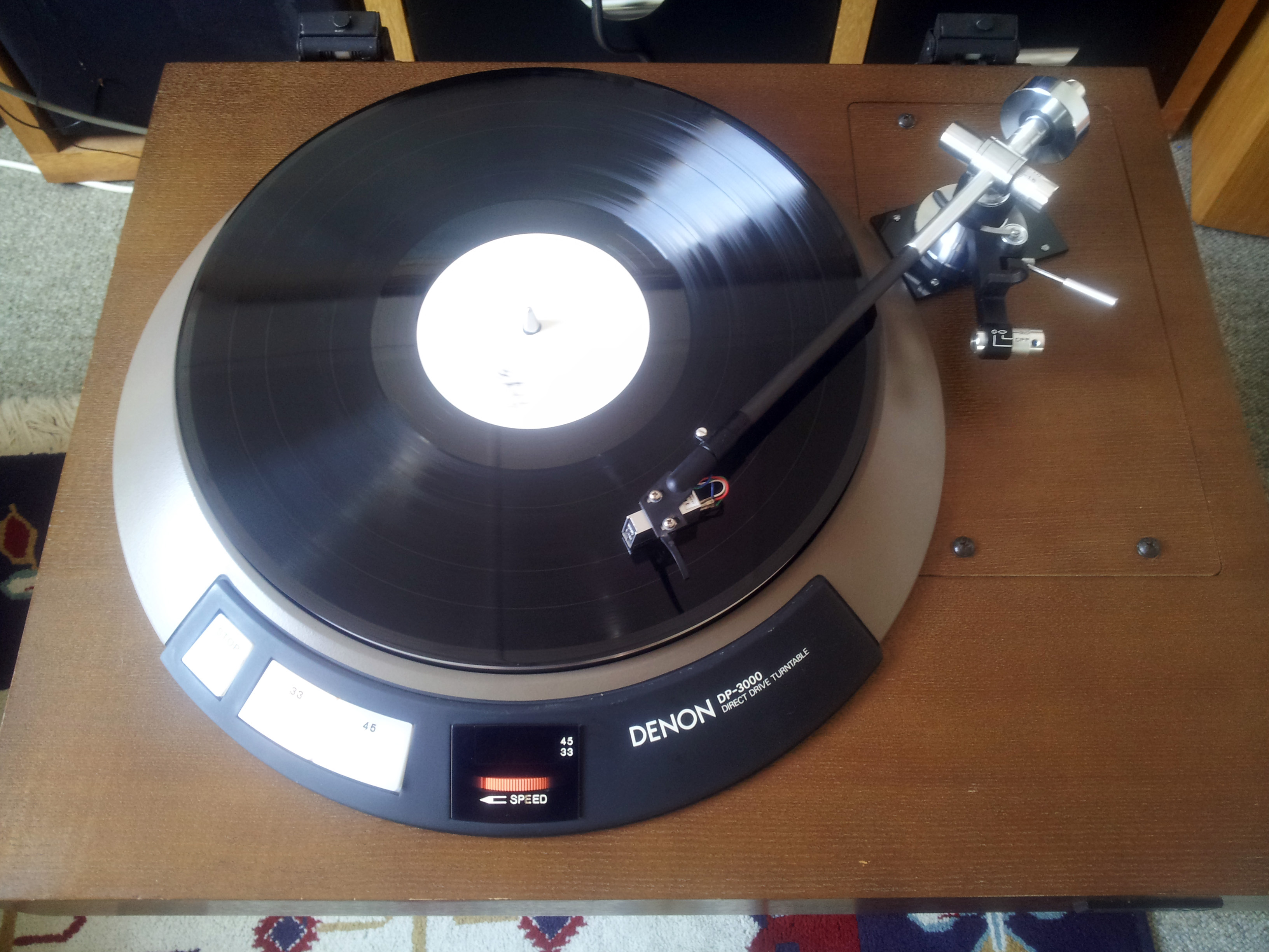 Denon DP-3500F Micro-Seiki CF1 Supex 901 Super